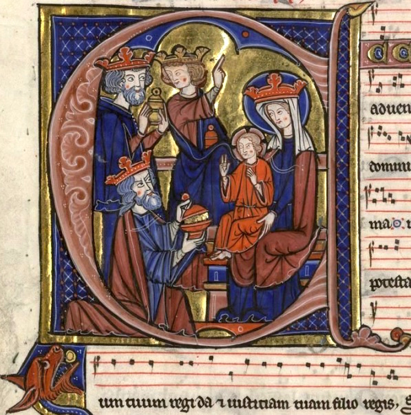 Graduel d'Aliénor - Adoration des Mages